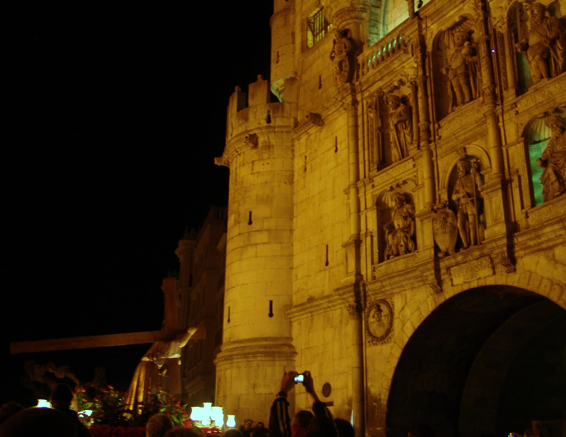 Procesión Jueves Santo “El Encuerto” Domingo de Ramos, paso de “Jesús con la cruz a cuestas” , de la parroquia de “San Cosme y San damián” bajo Arco de Santa María, Burgos, España